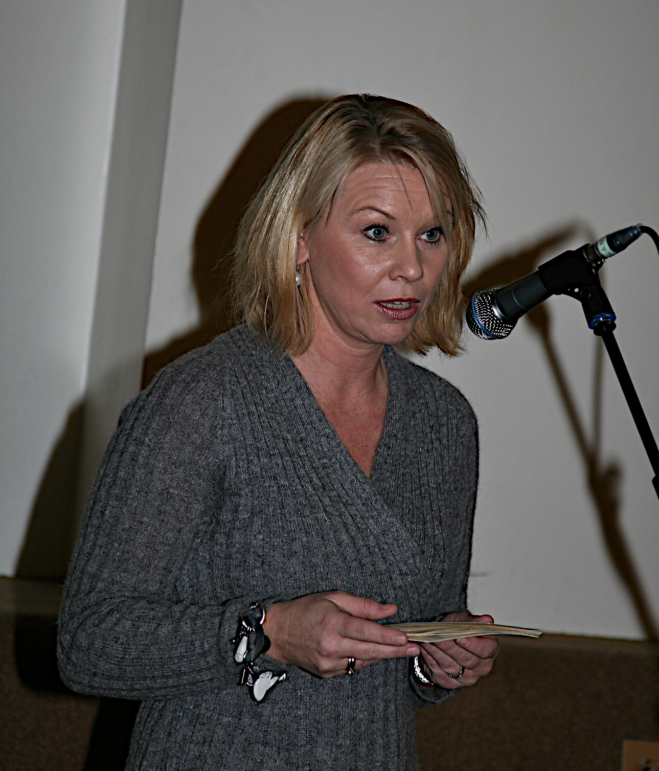 Monica Mæland